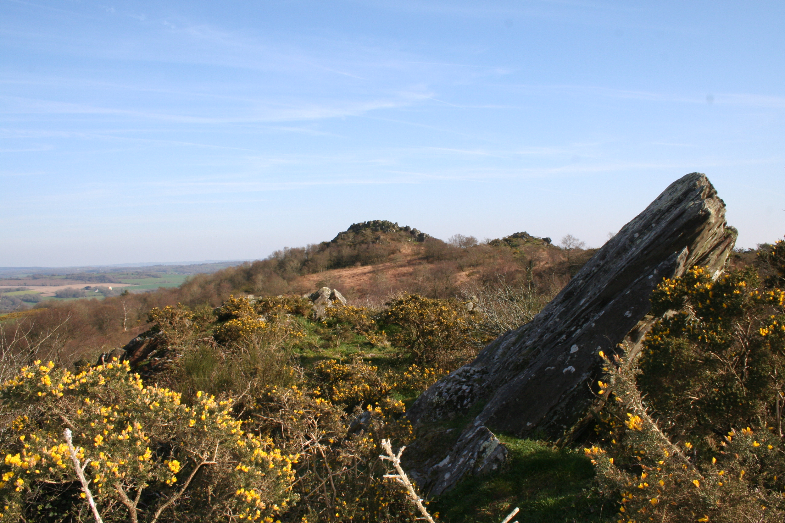 La Roche Du Feu